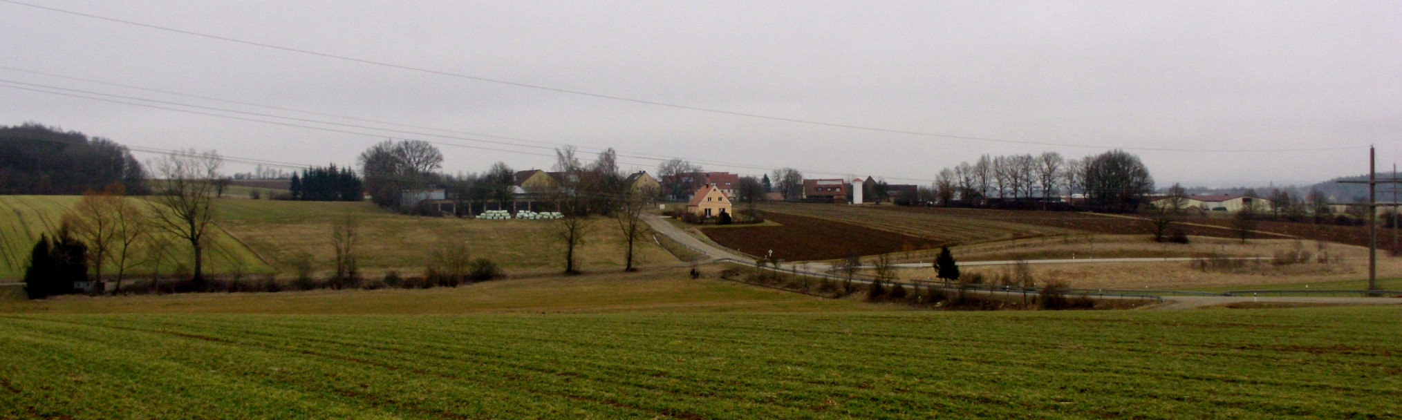 Maicha, Gemeindeteil von Gunzenhausen im mittelfränkischen Landkreis Weißenburg-Gunzenhausen